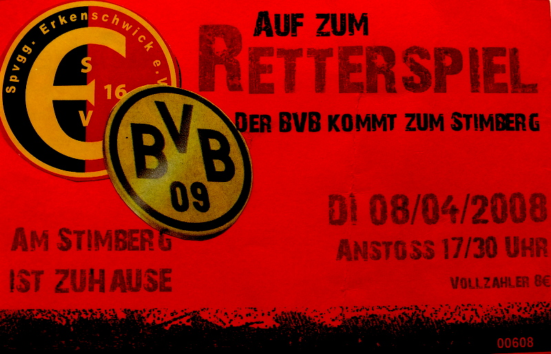 Eintrittskarte Reundschaftsspiel ESV-BVB